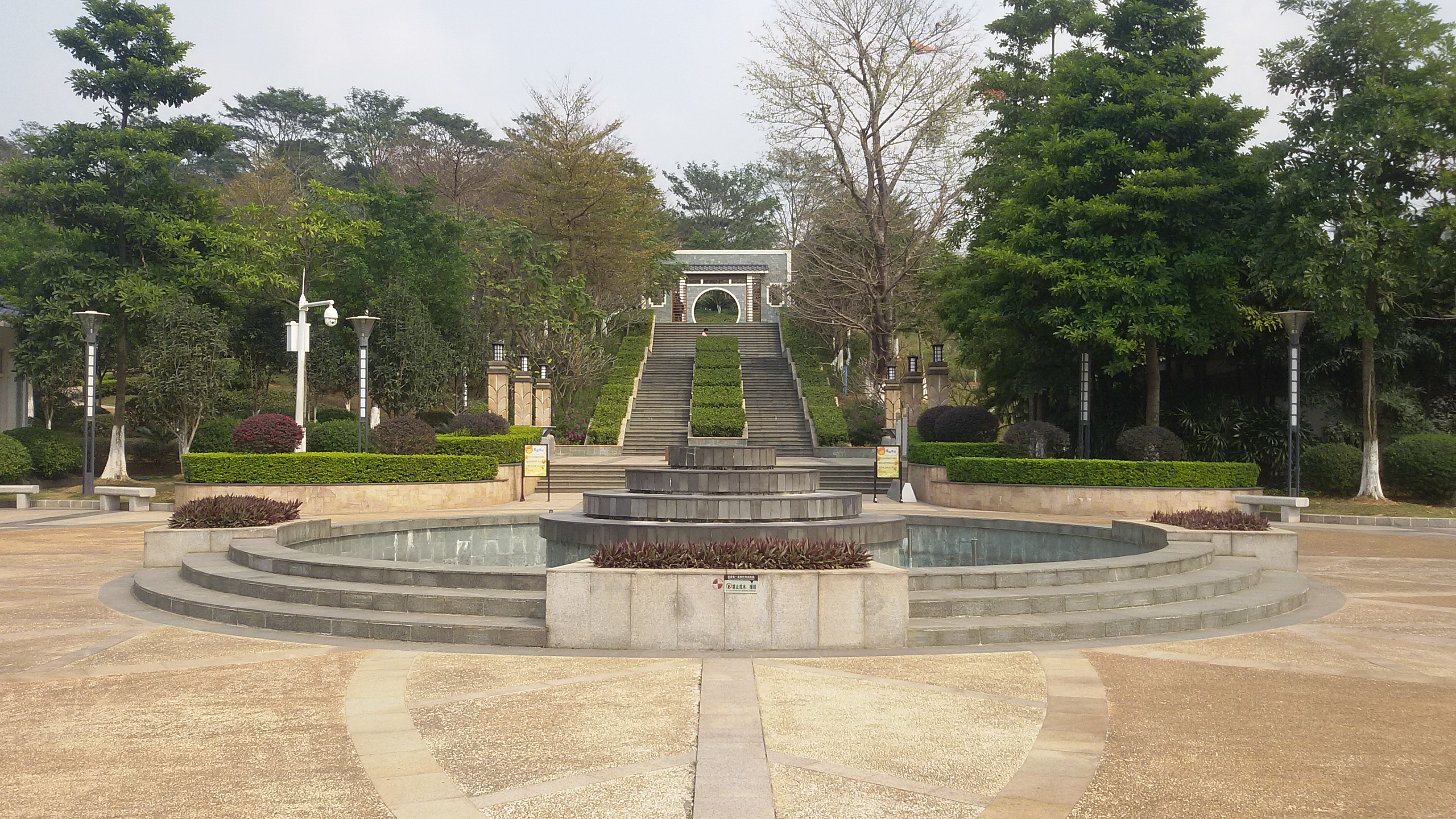 粵語: 攬勝園嘅正門